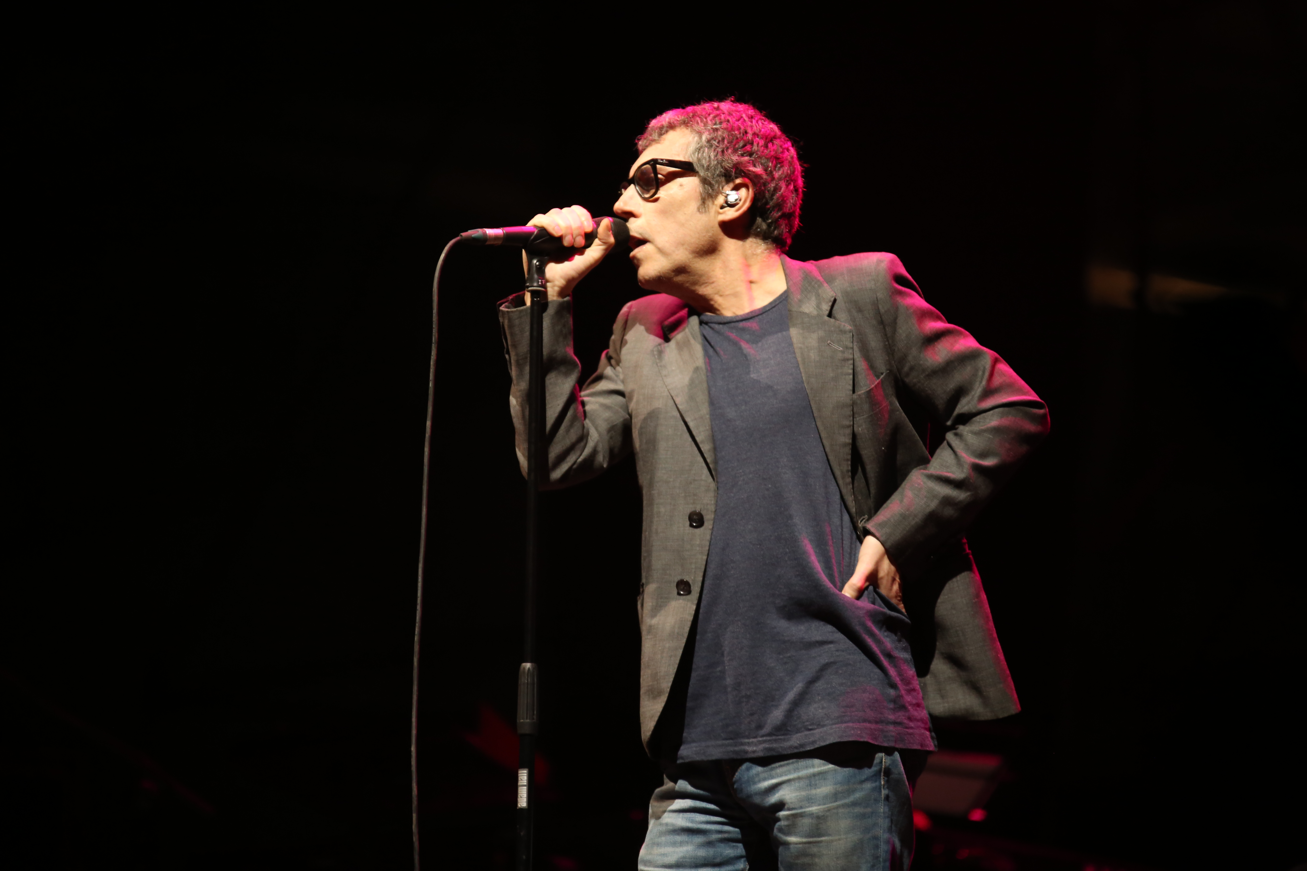 Iván Ferreiro